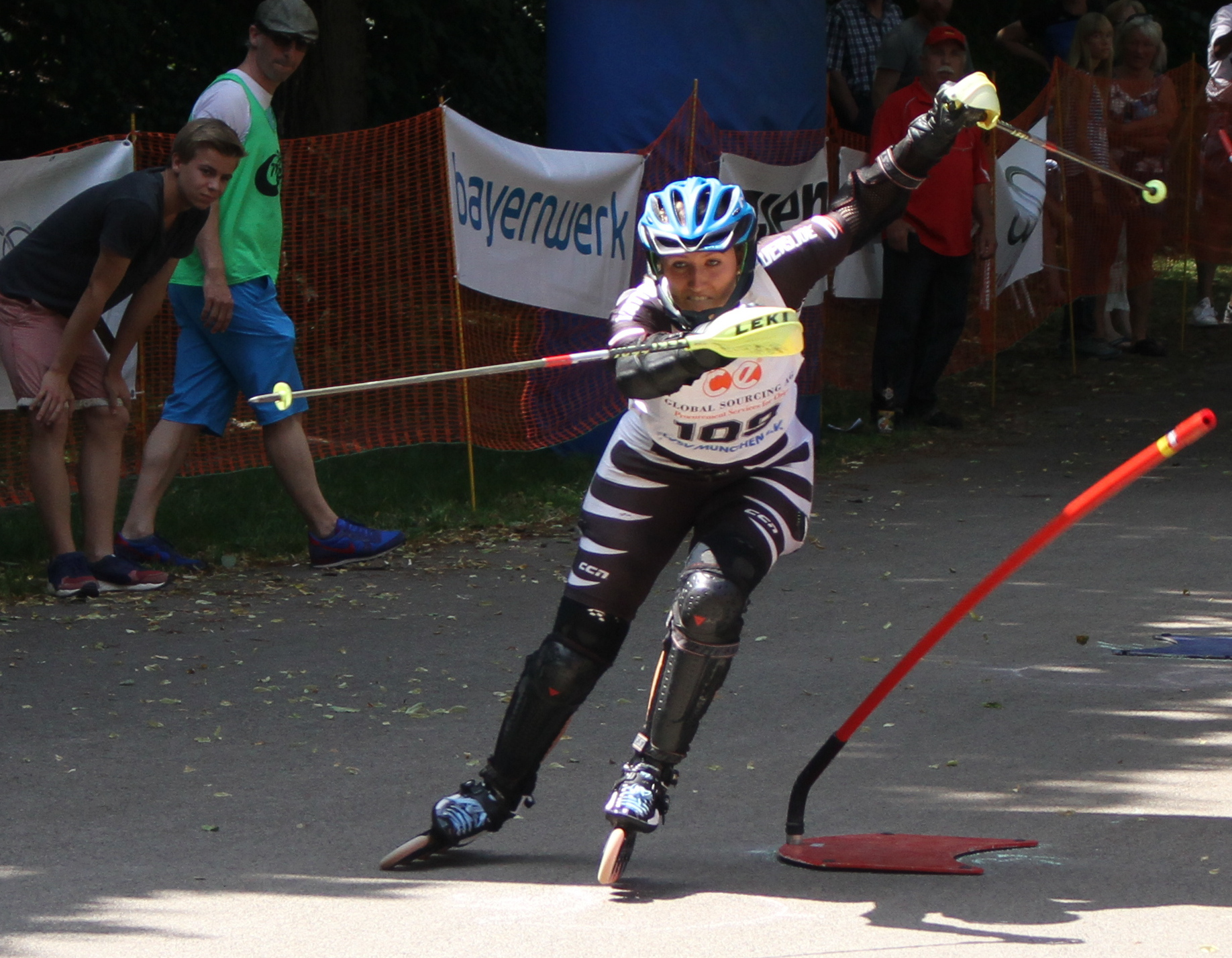 cropped from File:Inline alpine 2015 0219.JPG - Alessandra VEIT, TG Tuttlingen, Inline-Alpin - Internationaler Münchner Inline Cup, Westpark, München.